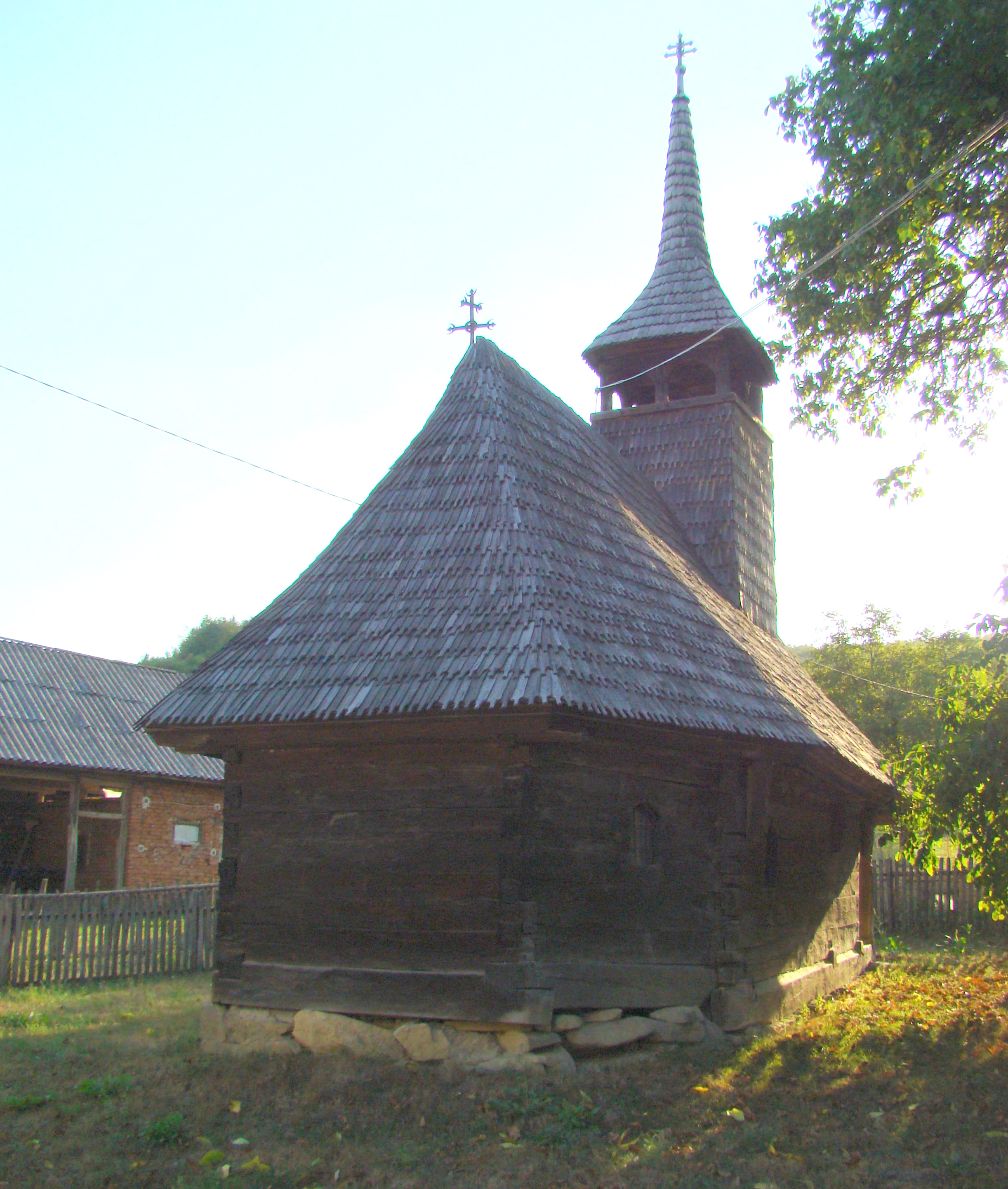 Biserica de lemn "Cuvioasa Paraschiva" , sat STEJERA; comuna MIREŞU MARE